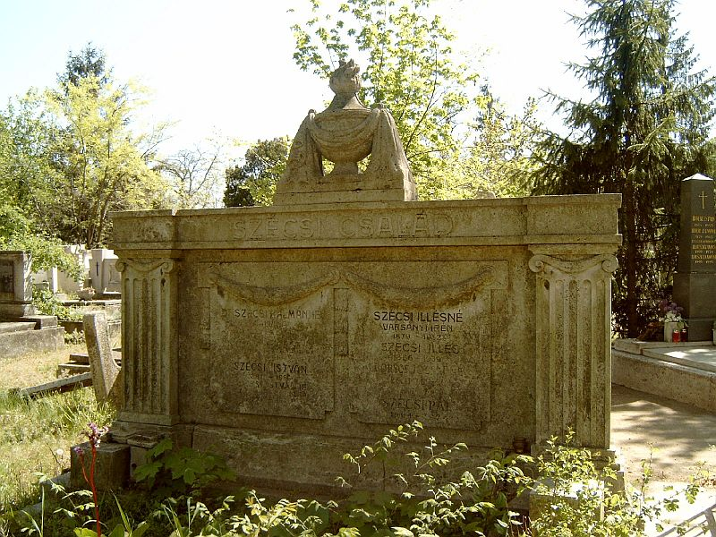 Varsányi Irén, Szécsi Illésné (Győr, 1880. aug. 16. – Bp., 1932. okt. 17.) színésznő sírja a Szécsi család sírboltjában Budapesten. Új köztemető: 22/2-1-1.